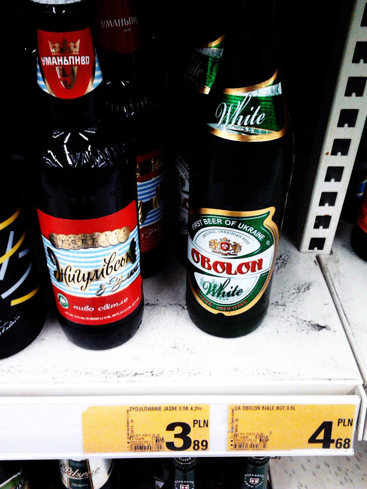 Пиво Жигулівське з Умані та Оболонь Світле на полицях гіпермаркету Ашан. Лом'янкі. Польща.